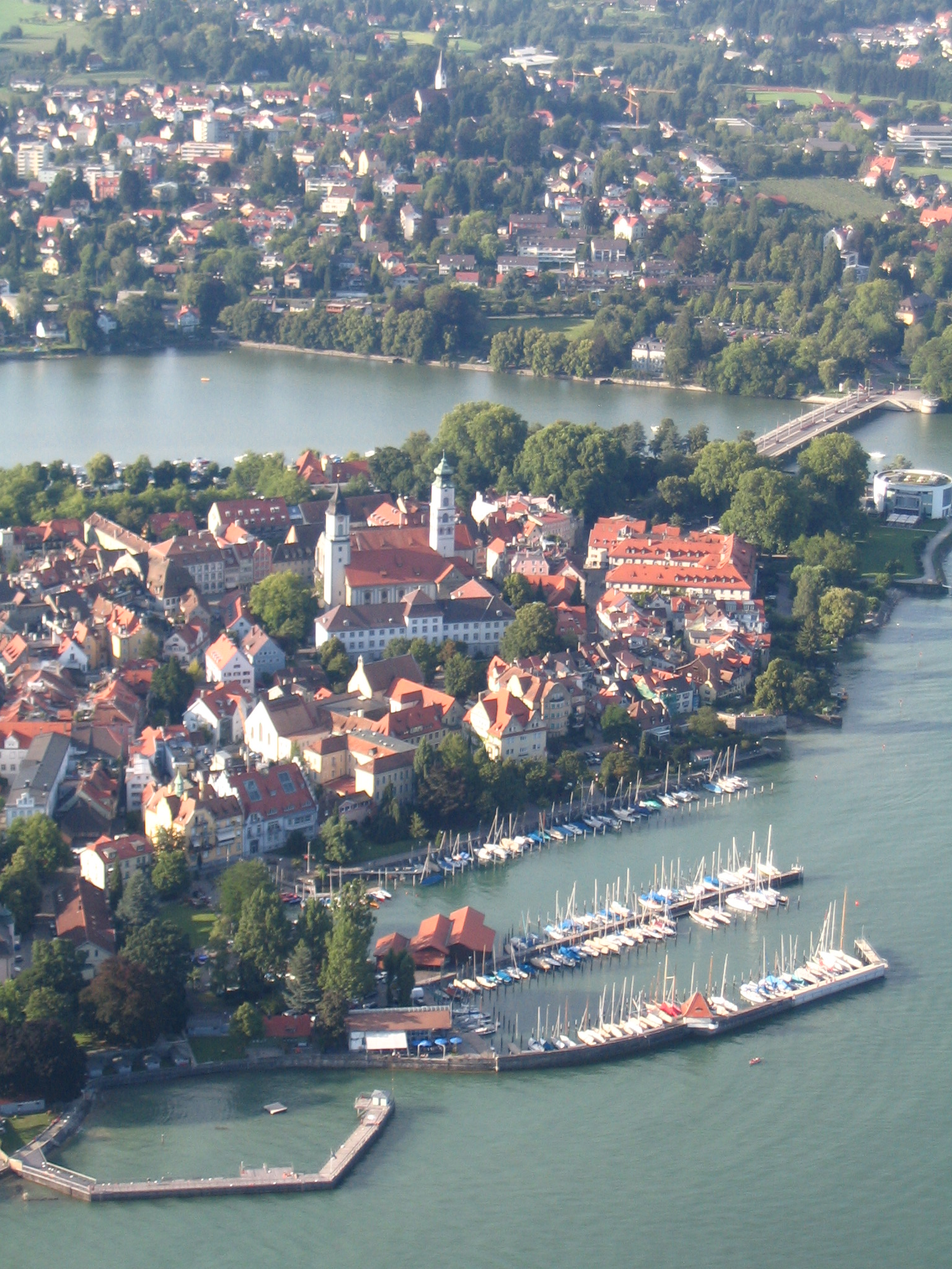 Lindau im Bodensee: Münster „Unserer Lieben Frau“ (ehemals Stiftskirche Mariä Himmelfahrt) und ev. Kirche St. Stephan